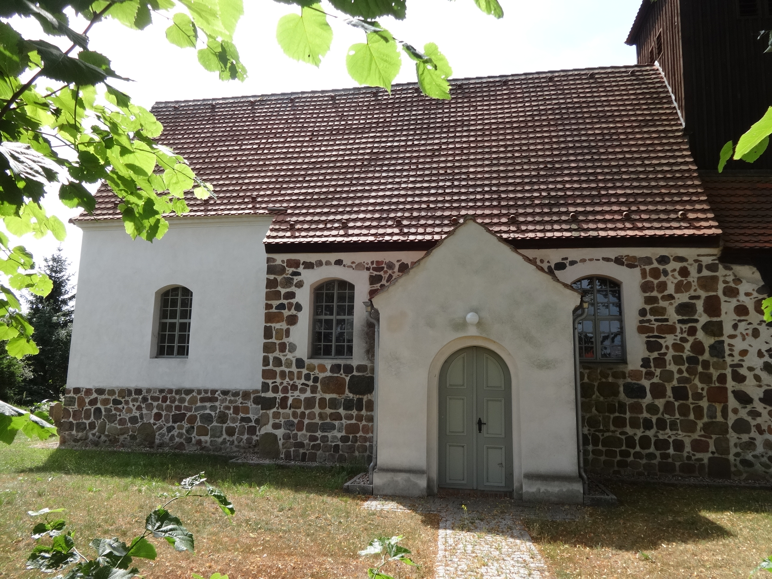 Die Dorfkirche in Schönefeld ist eine Feldsteinkirche aus dem 13. Jahrhundert in Beelitz im Landkreis Potsdam-Mittelmark in Brandenburg. Sie wurde barock überformt und um einen Westturm ergänzt. Im Innern befinden sich ein Kanzelaltar aus dem Jahr 1715 sowie Reste mittelalterlicher Wandmalereien.